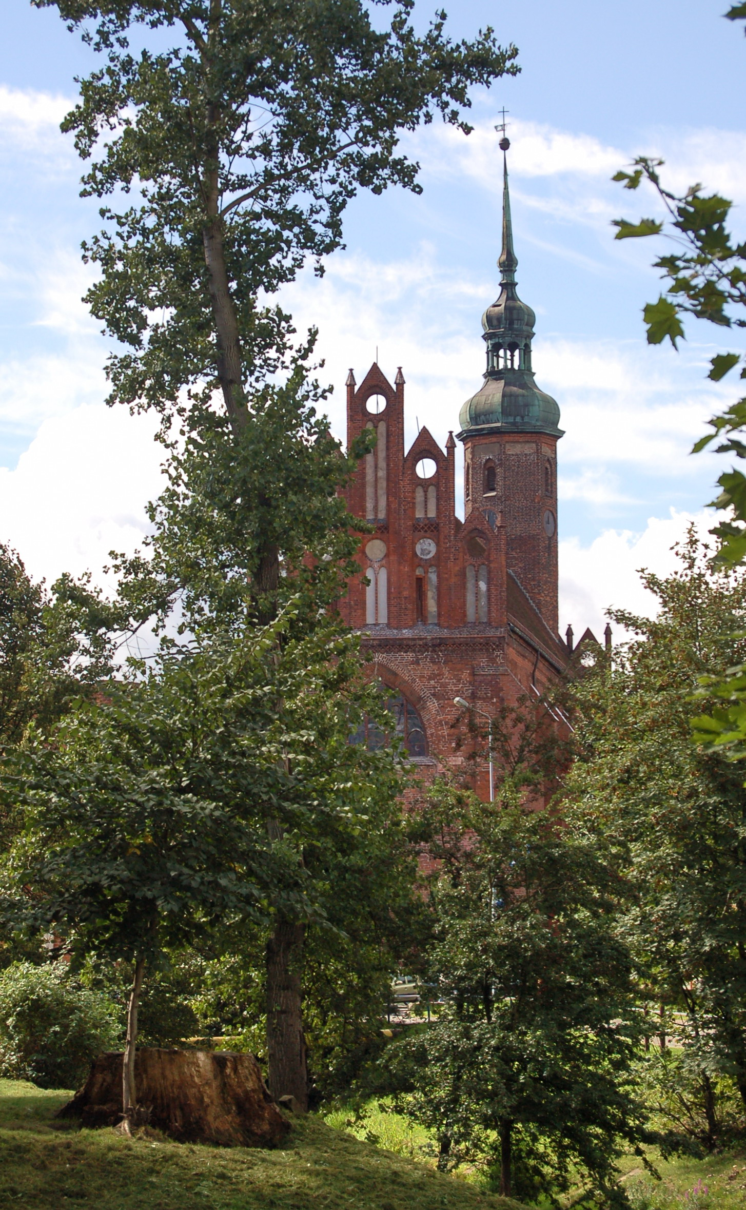 Słupsk, ul. Dominikańska 3 - dawny kościół klasztorny dominikanów (zamkowy, przed 1945 p.w. św. Jana Chrzciciela), obecnie rzymskokatolicki kościół parafialny pw. św. Jacka, 1 poł. XV, 1602, 1777-1779, 1875, 1892,1900, 1946